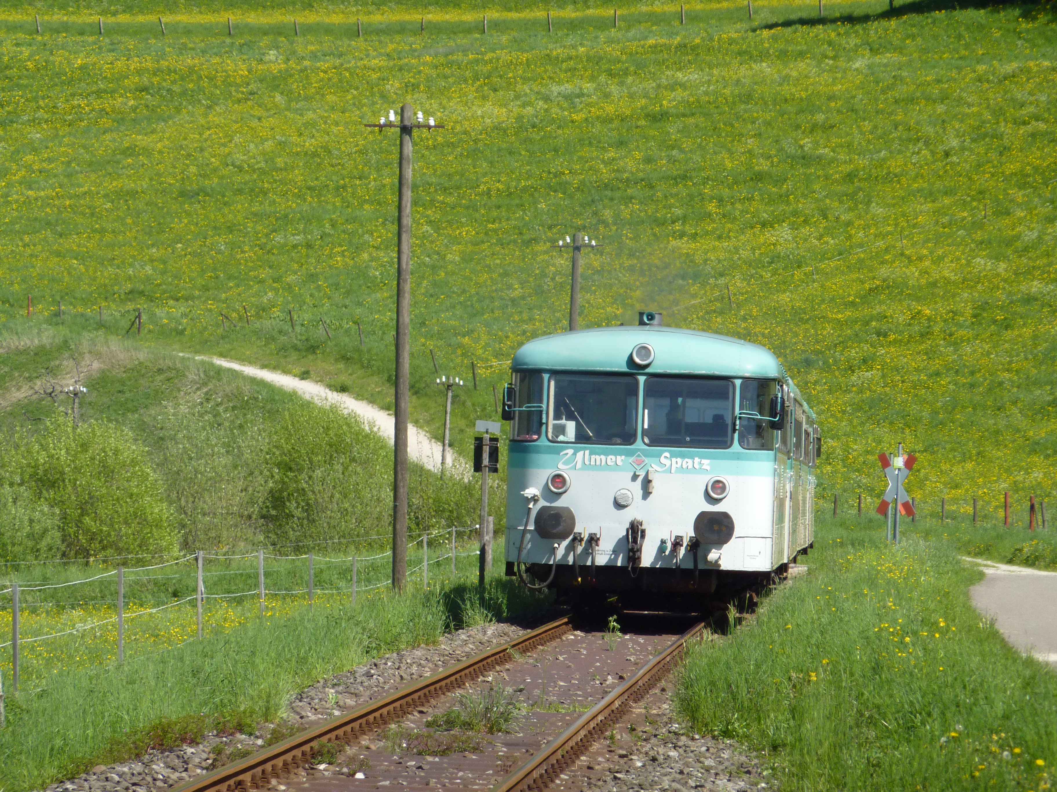 Rückansicht des Ulmer Spatzes